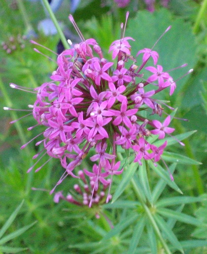 fleur de crucianelle.jpg